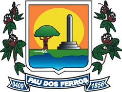 Brasão de Pau dos Ferros, estado do Rio Grande do Norte, Brasil.